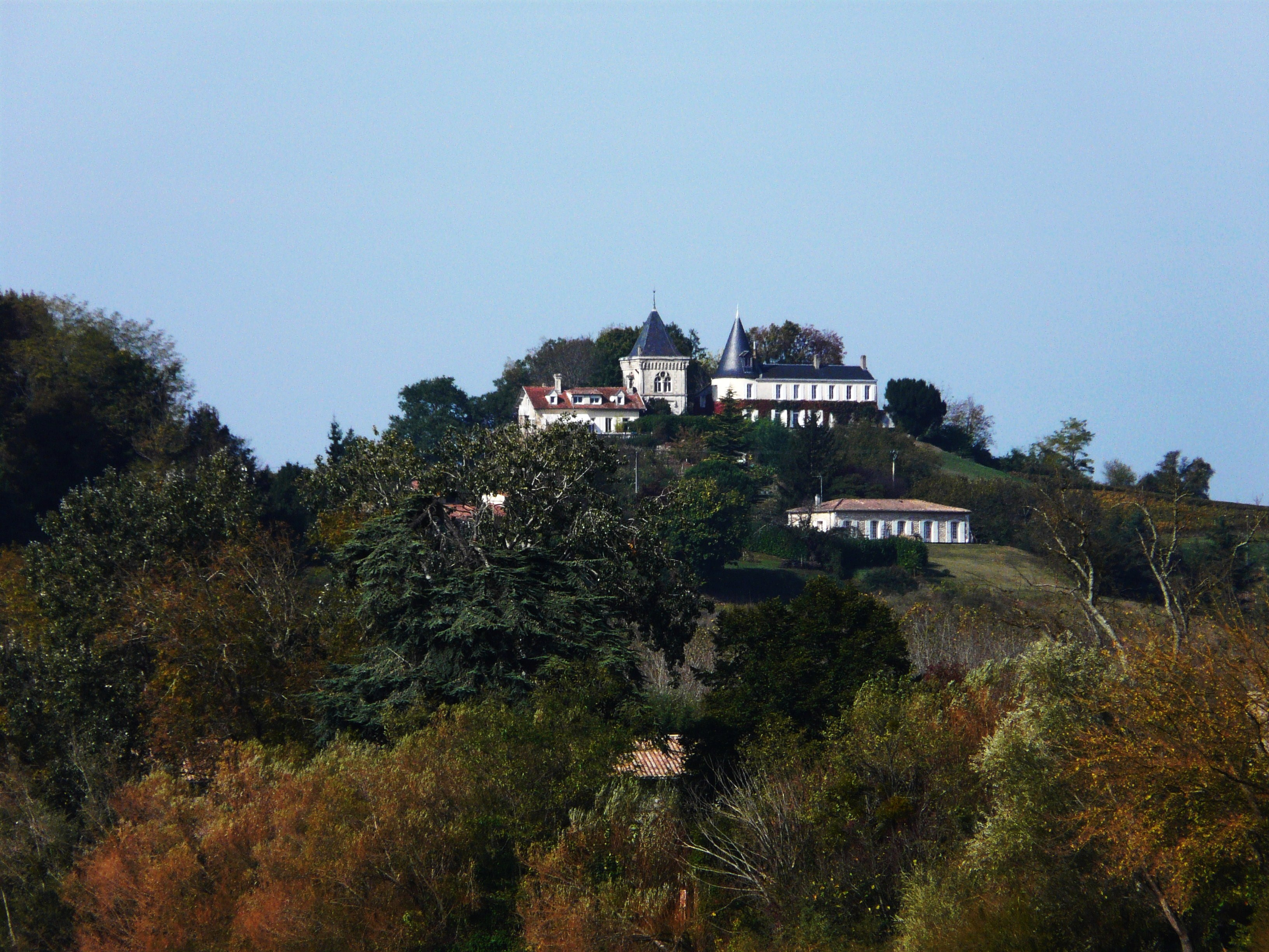 Fronsac, Gironde, France (vue prise depuis Libourne)